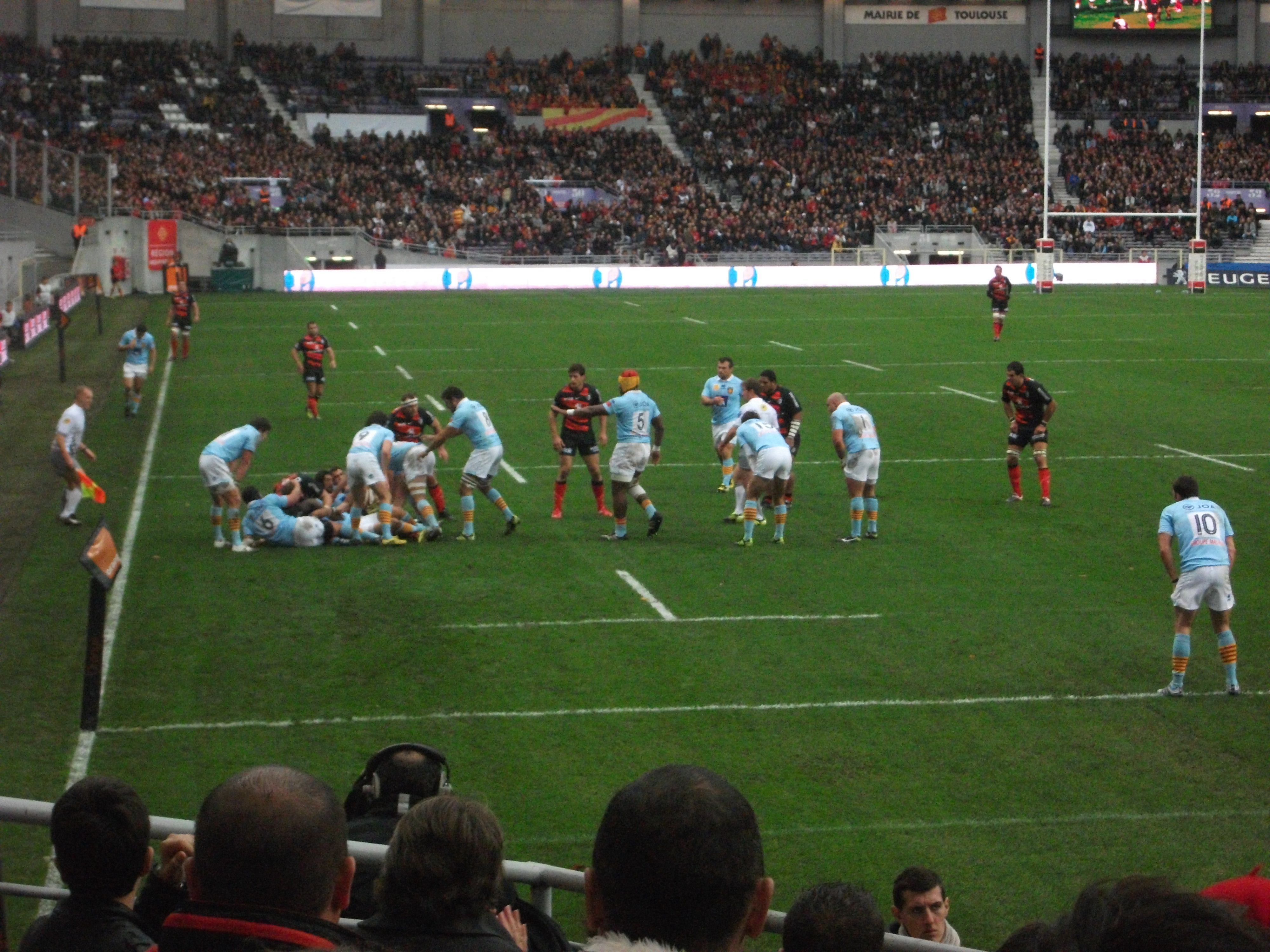 ruck entre Toulouse et Perpignan